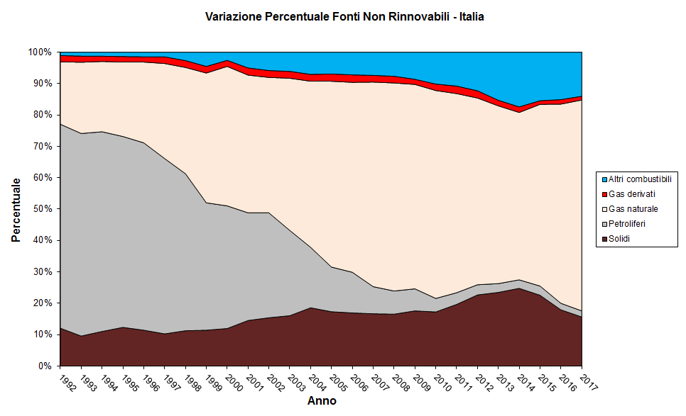 Riepilogo storico variazione percentuale produzione energia non rinnovabile italiana.